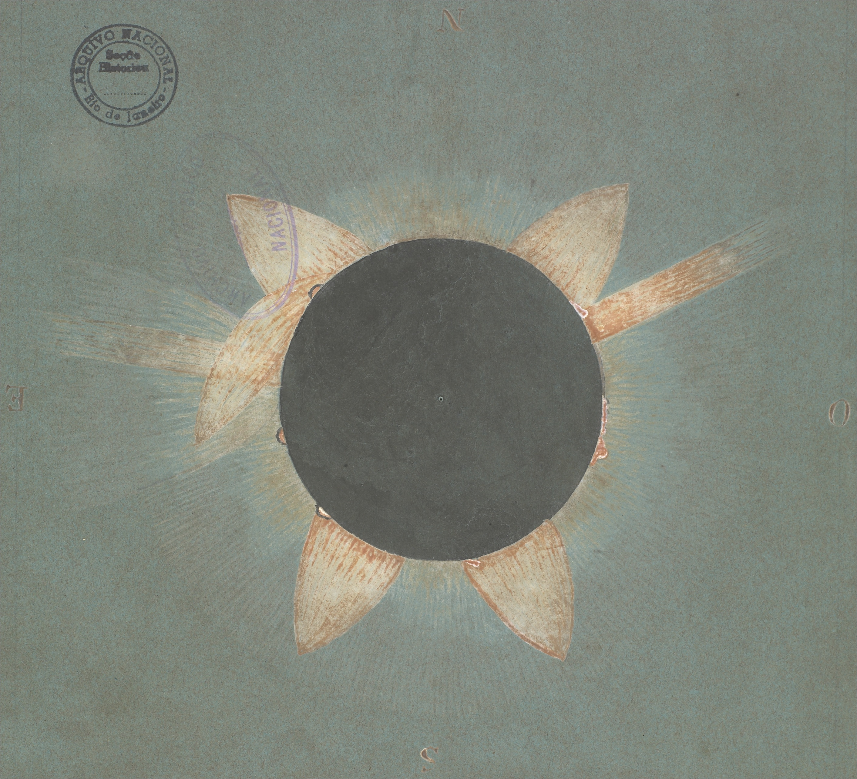 Ilustração do eclipse solar de 7 de setembro de 1858, registrado pela Comissão Astronômica instituída pelo Imperador d. Pedro II e enviada à cidade de Paranaguá, no Paraná, para observar o fenômeno. Fundo: Série Educação - Observatório Astronômico (IE8).